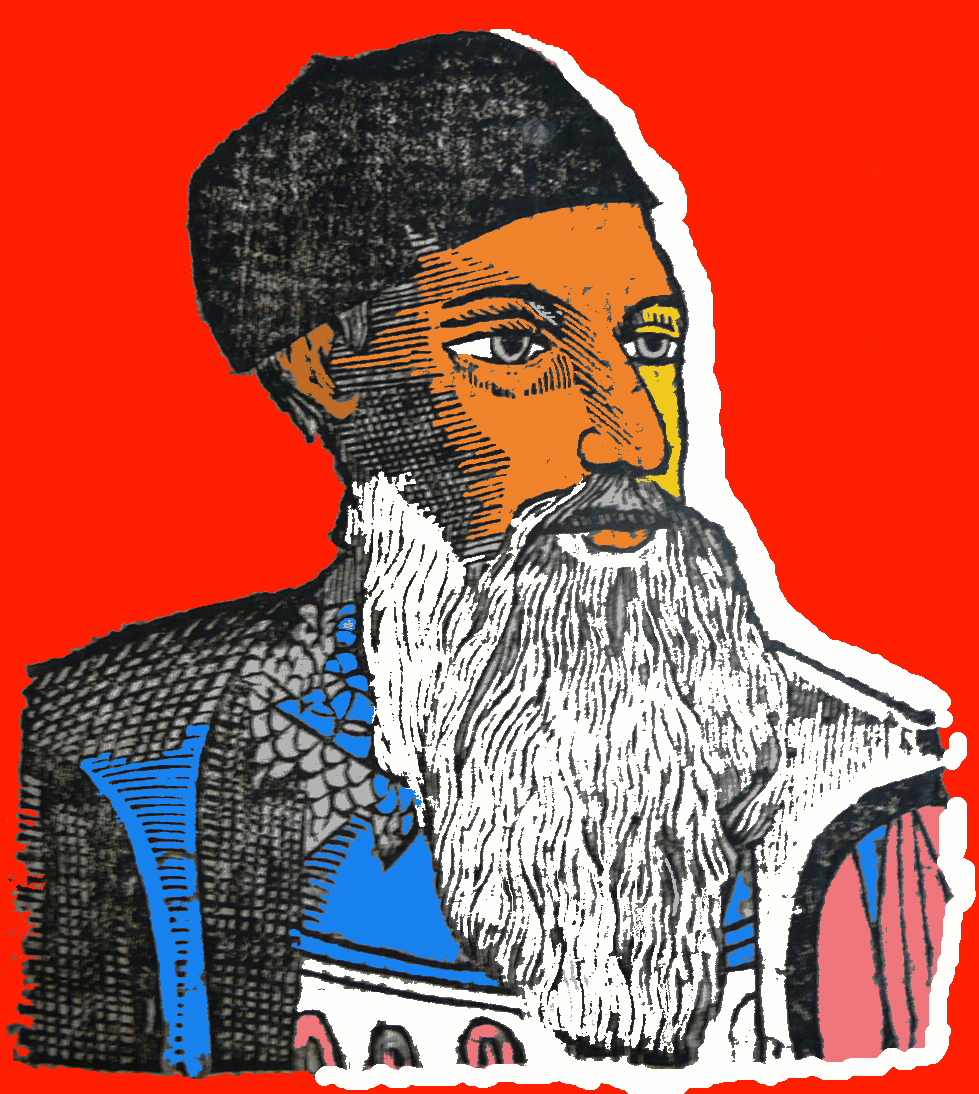 Portrait de Diogo_Lopes_de_Sequeira, gouverneur de l'Inde Portugaise